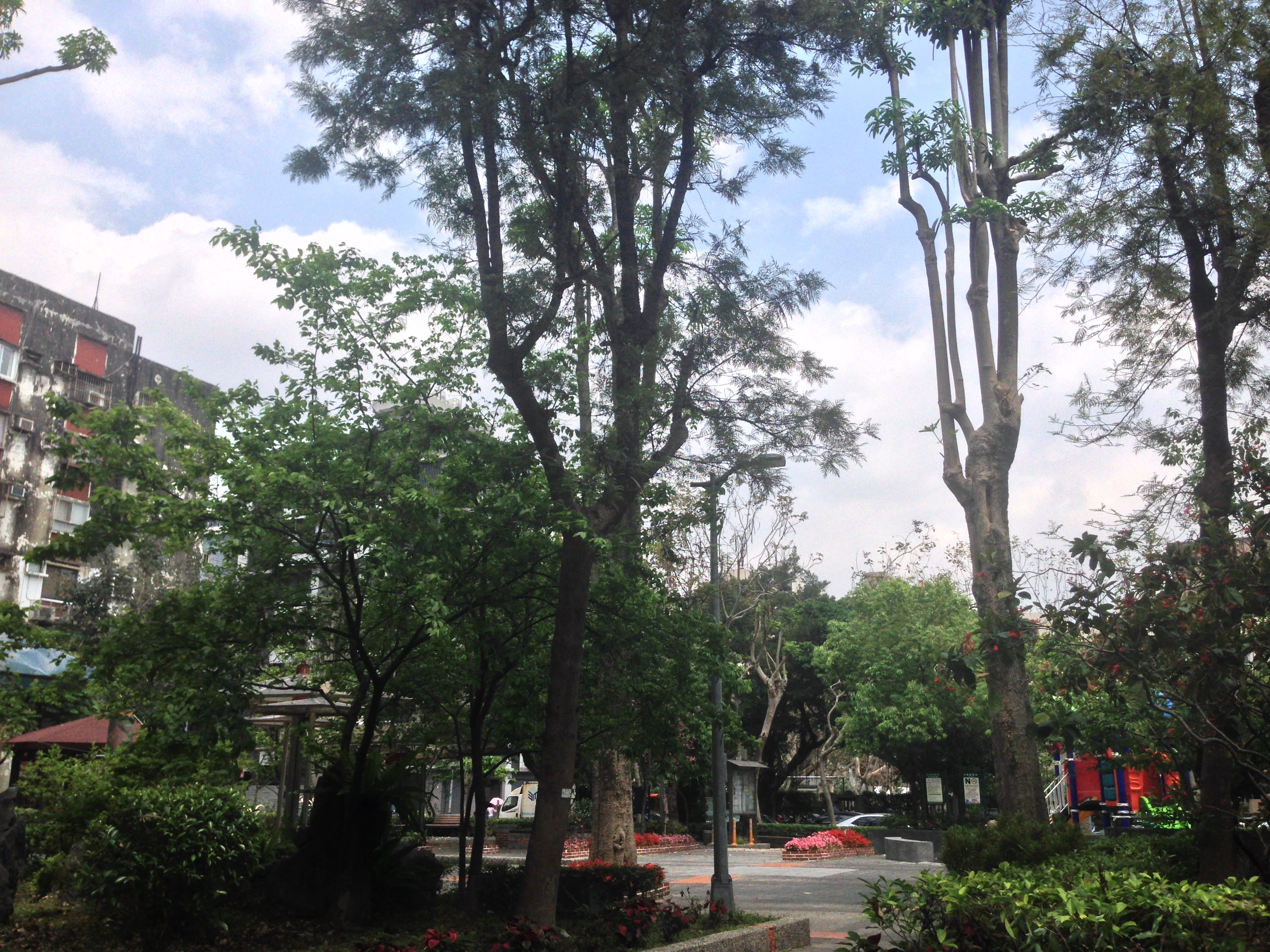 中文（台灣）: 台北市松山區敦中公園